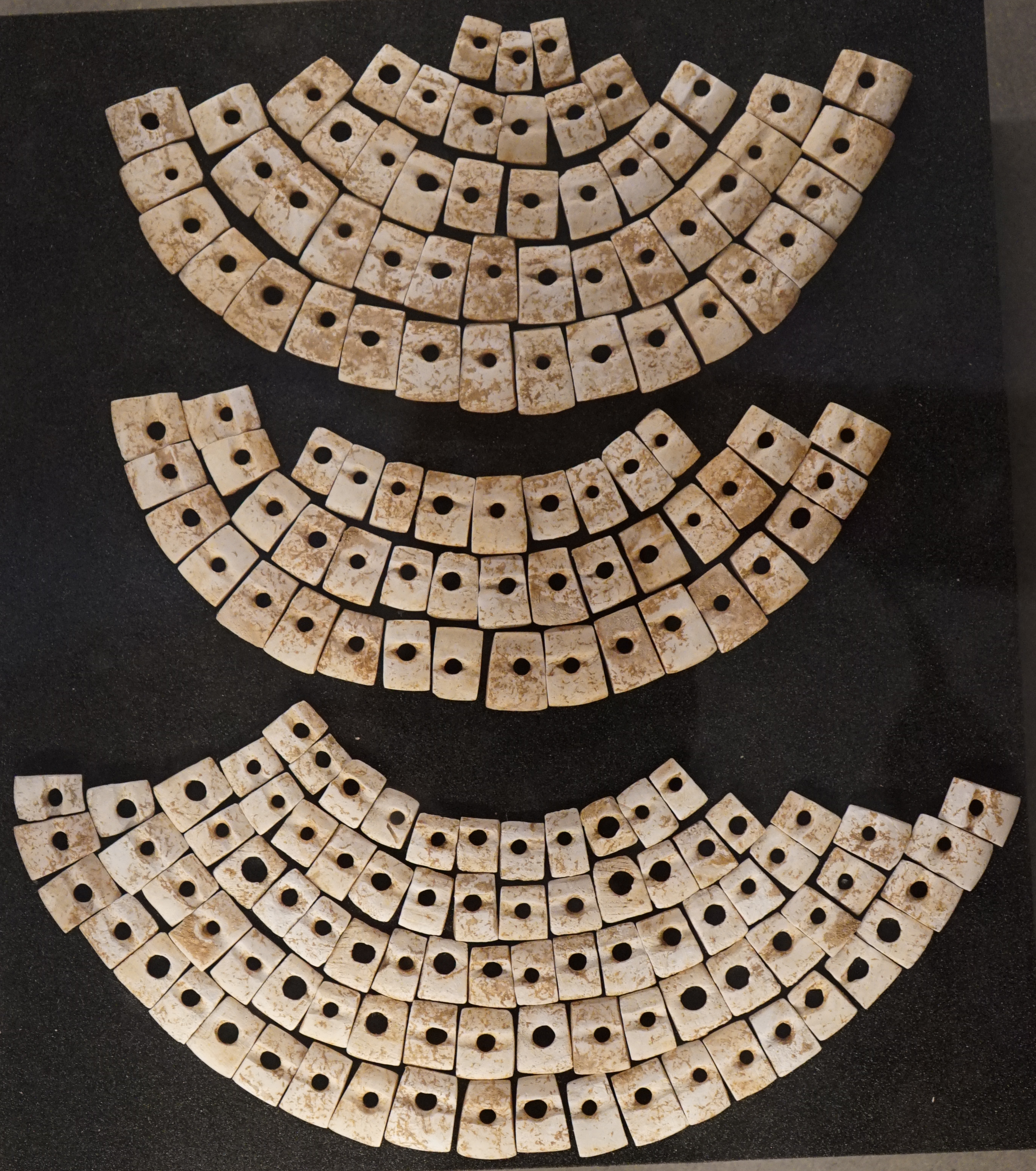 exposé à Troyes.